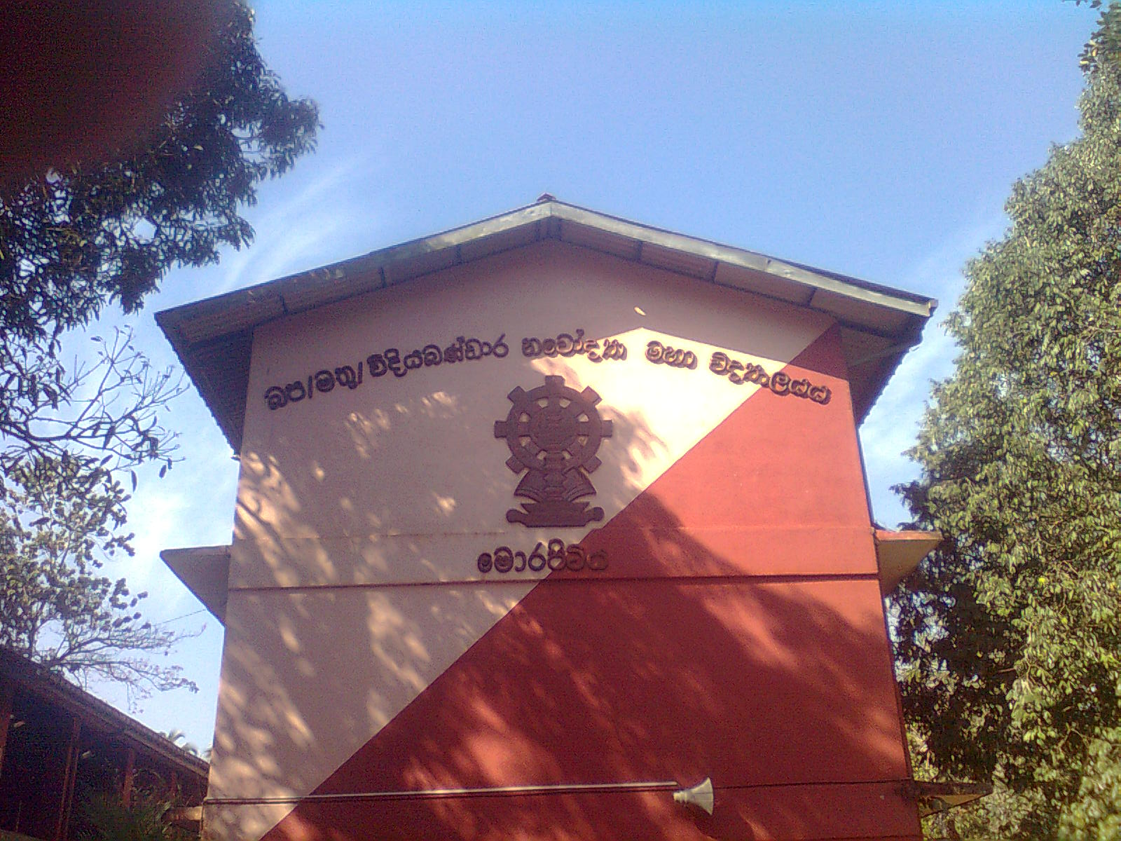 සිංහල: 3 මහල් ශාලාව